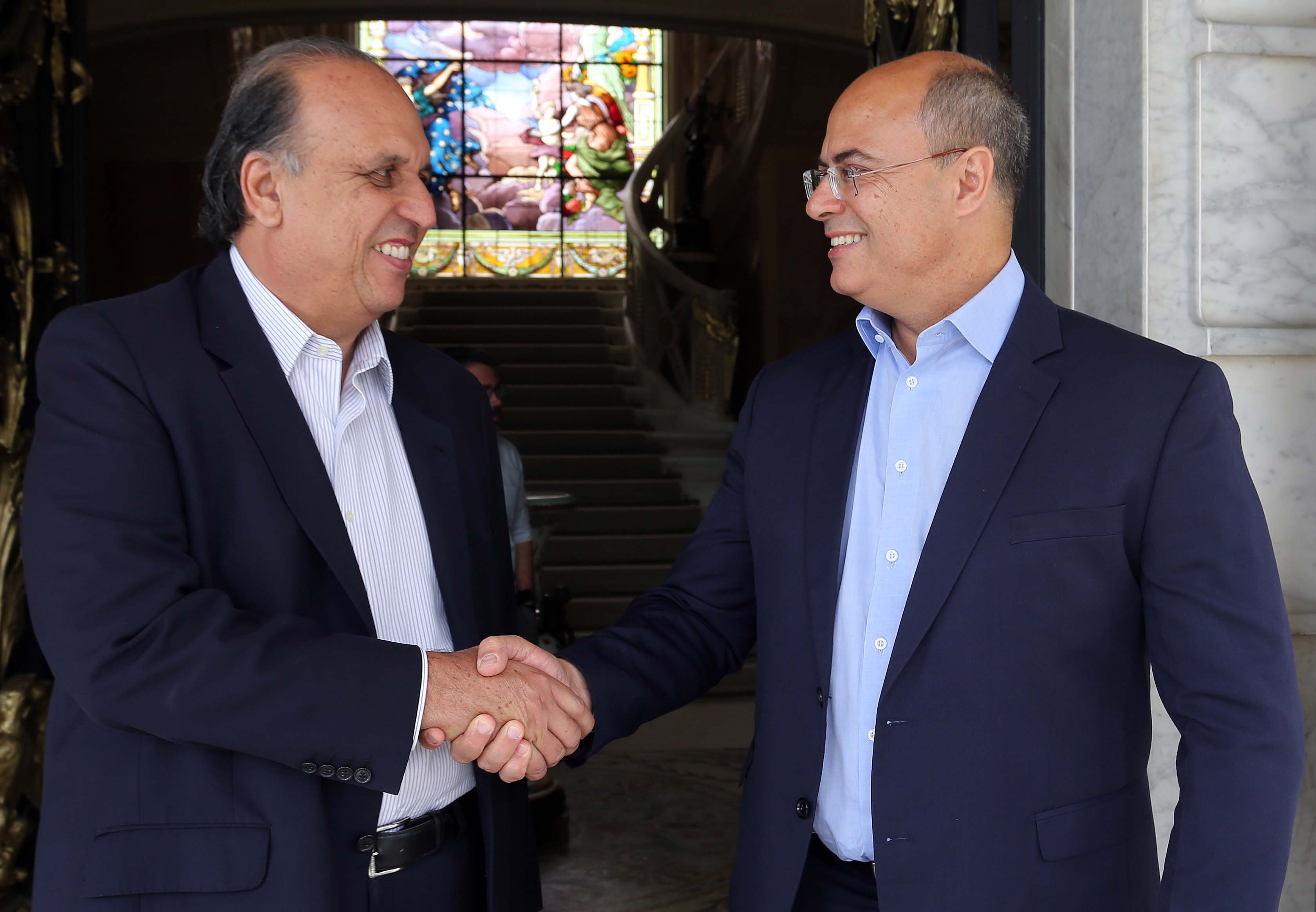 Rio de Janeiro - 11-09-2018 Governador Pezão e o governador eleito Wilson Witzel. Foto Oficial: Carlos Magno